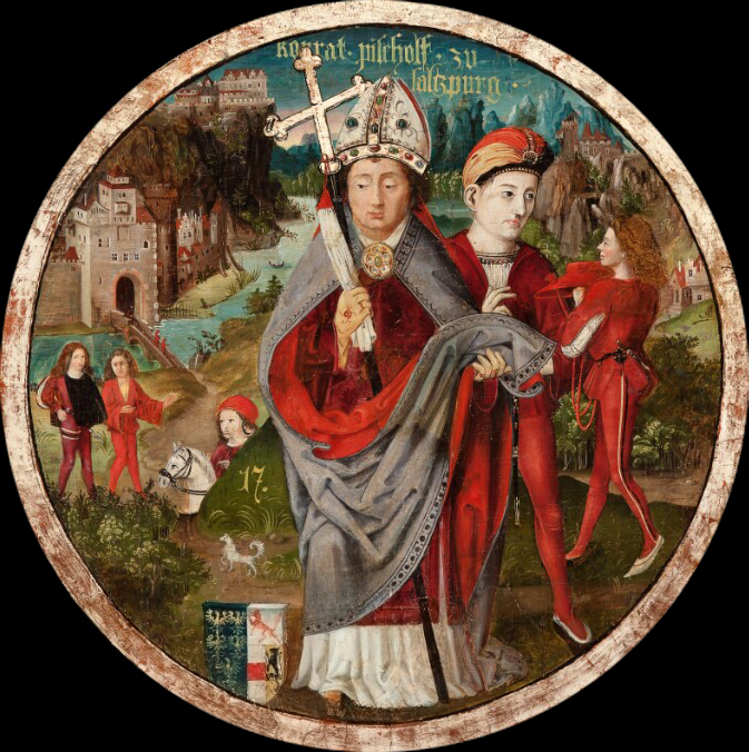 Erzbischof Konrad von Salzburg (1164-1168), ein Sohn des Markgrafen Leopold III.. (Babenberger Stammbaum, Stift Klosterneuburg)